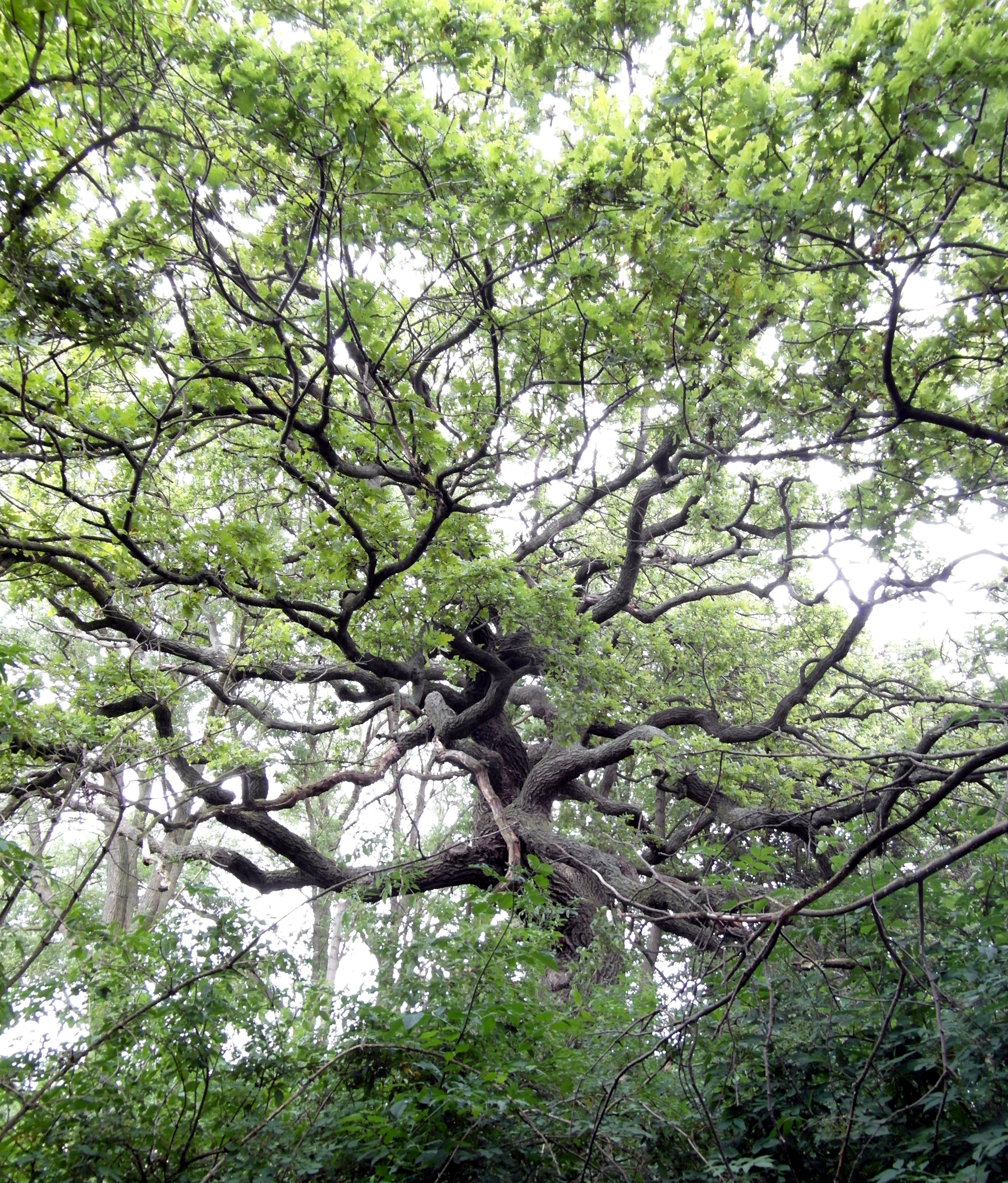 Eiche am Rehrenborn bei Degersen, eine als Naturdenkmal (ND-H 11) geschützte Stieleiche (Quercus robur) in Wennigsen (Deister), Region Hannover, Niedersachsen